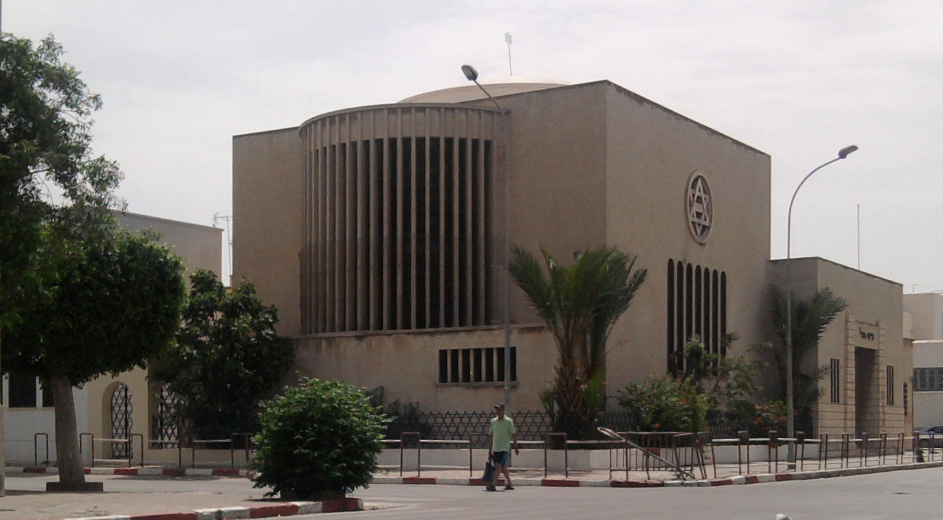 Synagoge Beit El à Sfax